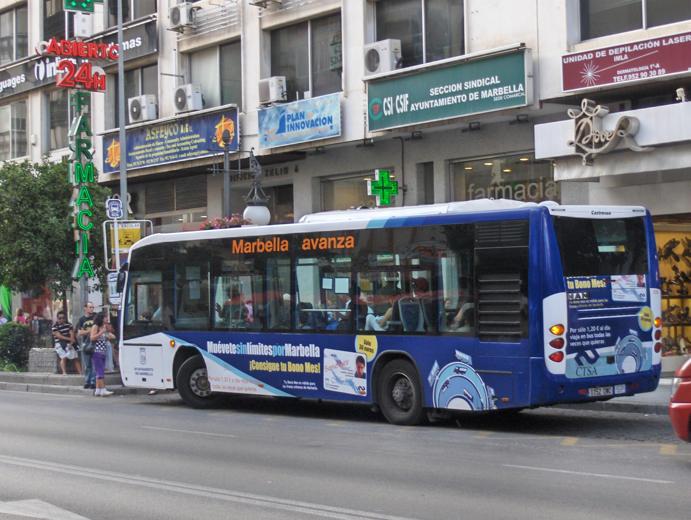 Autobús urbano de Marbella (España).